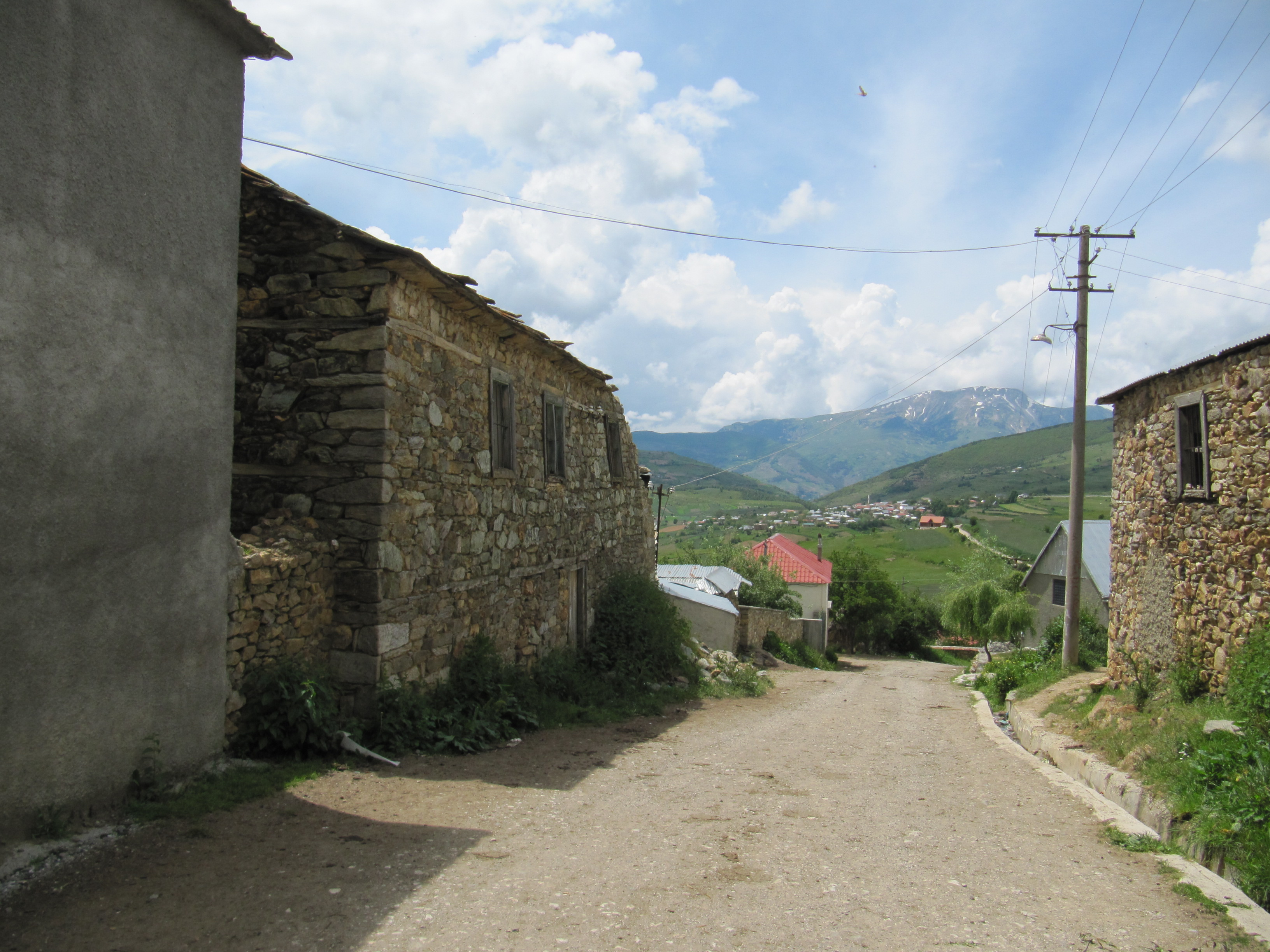 Rrugë në Shishtavec, Kukës